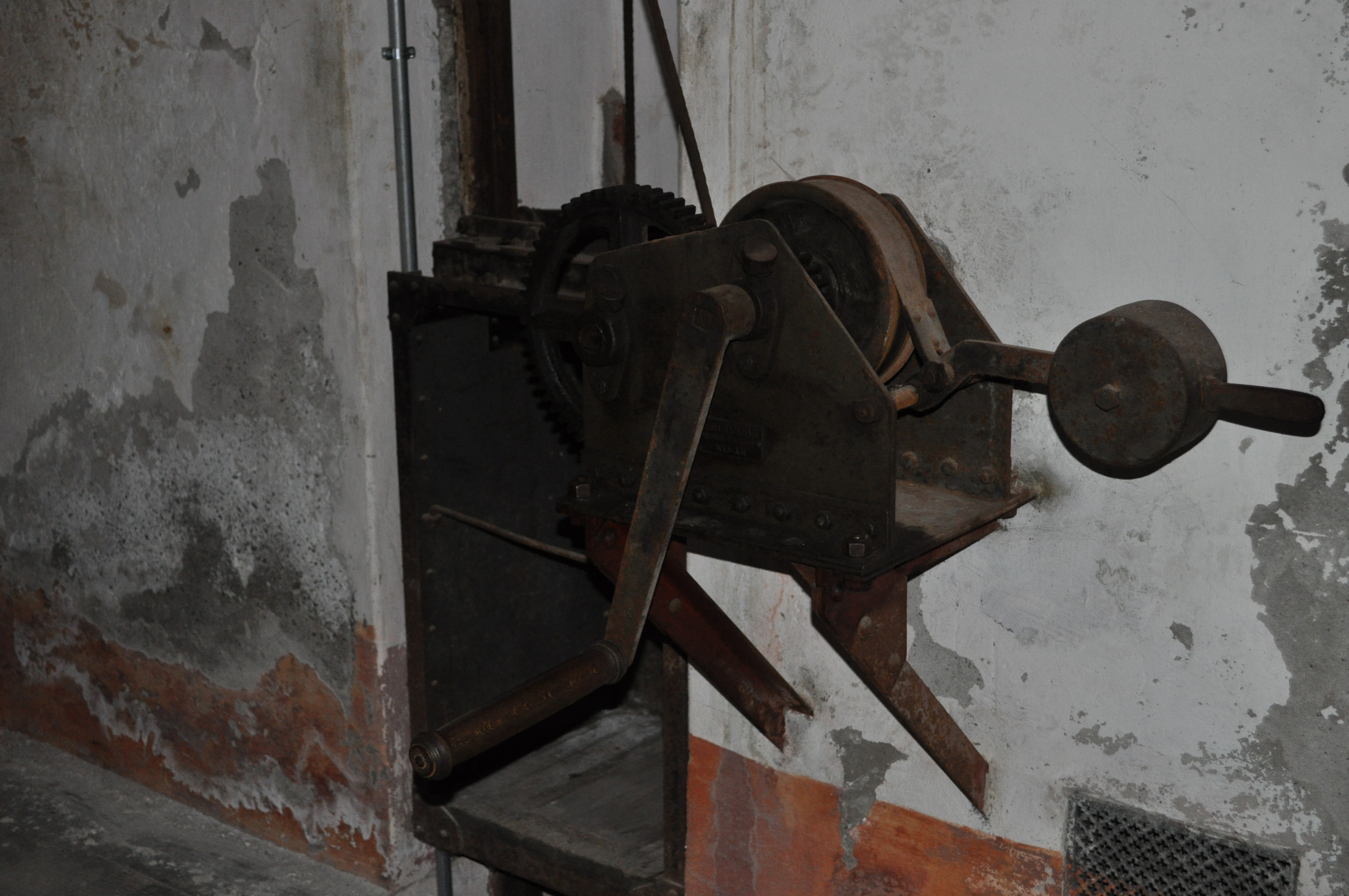 Meccanismo manuale che consente di trasportare i proietti dalle riservette al locale delle artiglierie tramite dei contrappesi inseriti nel muro